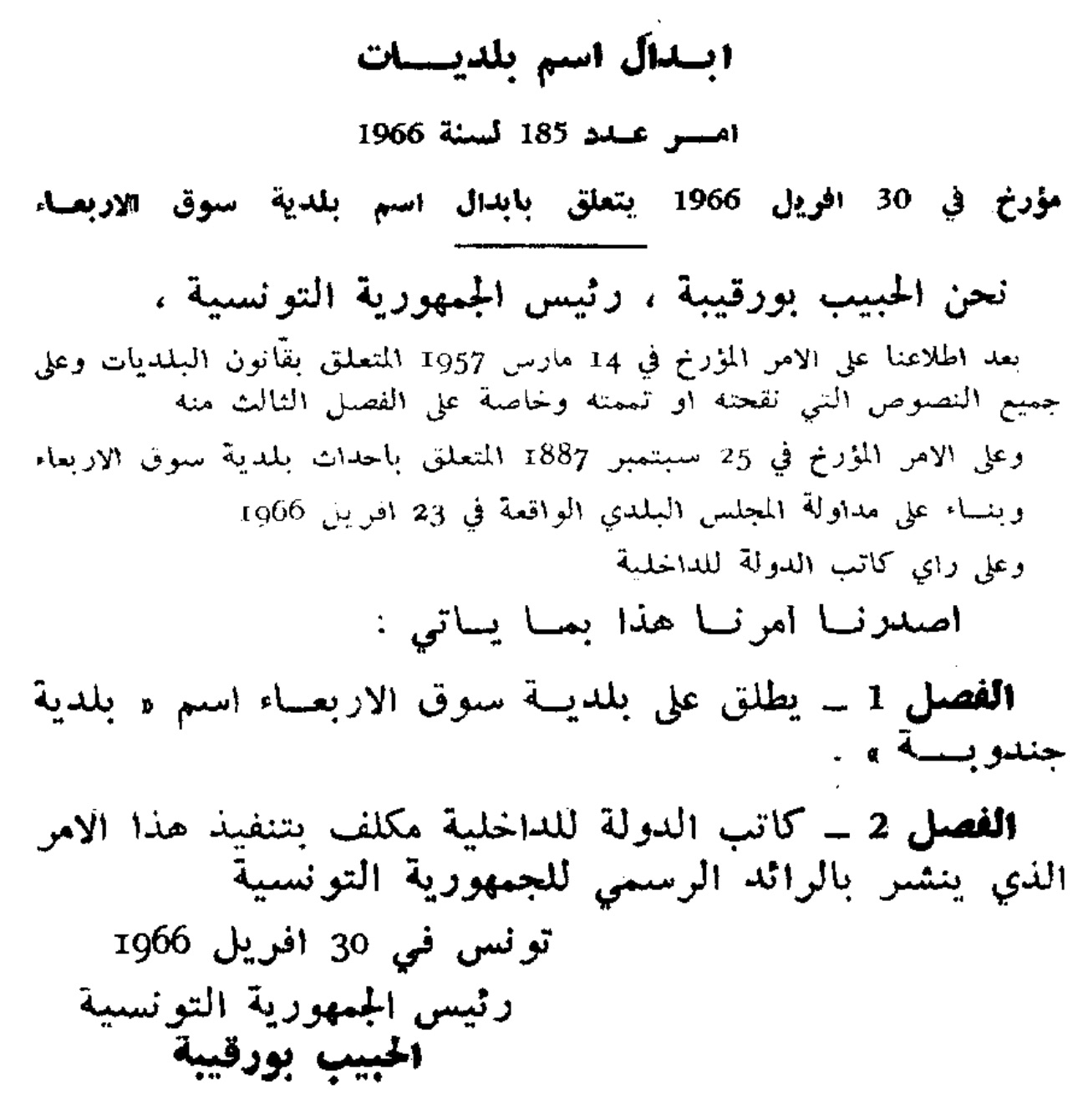 الأمر عدد 185 بتاريخ 30 أفريل 1966 المنشور بالرائد الرسمي للجمهورية التونسية، العدد 20 من السنة 109، الصادر في 3-6 ماي 1966